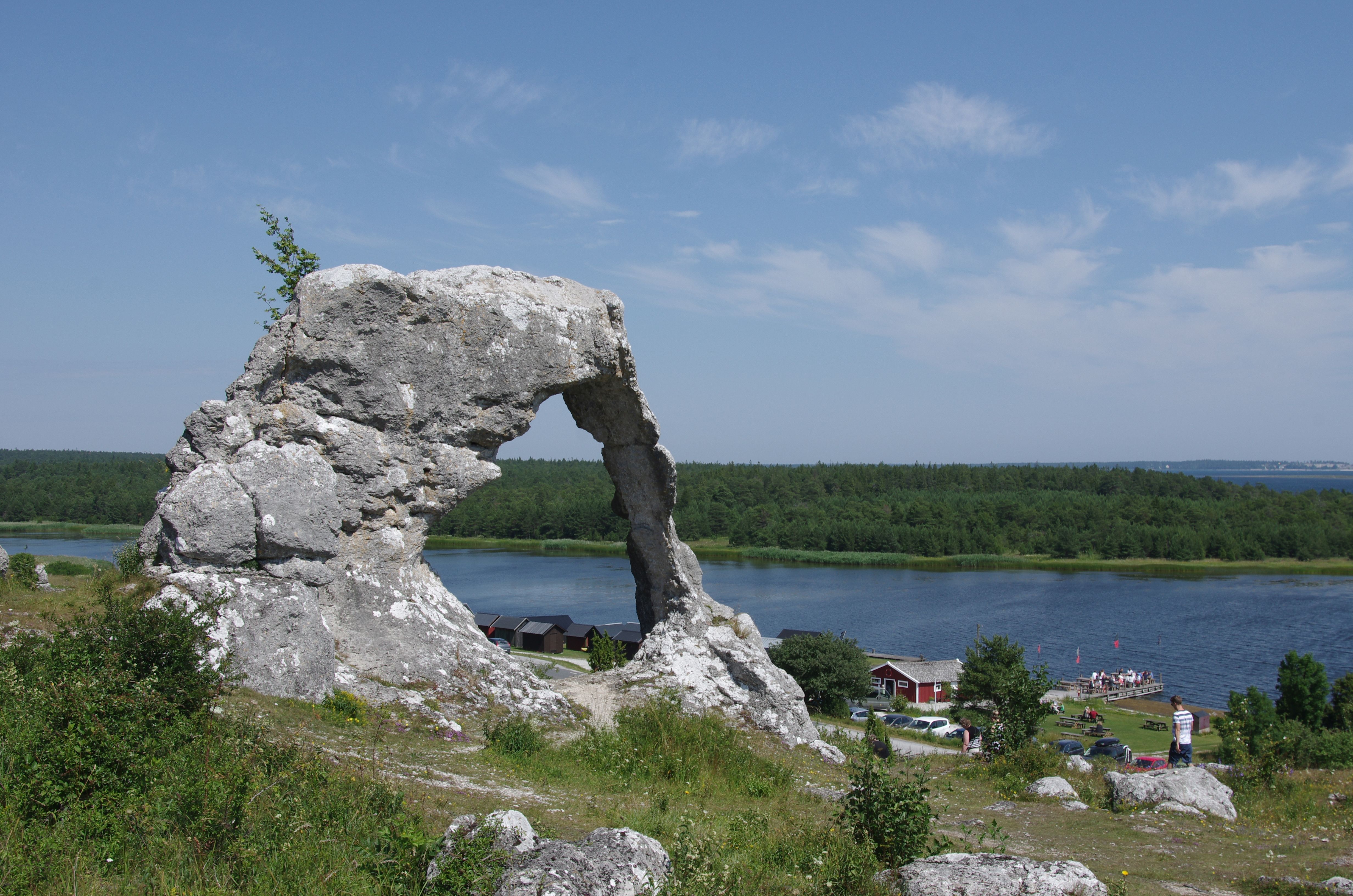 Lergrav Gotland in Gotland. Der Raukaur befindet sich oberhalb der Straße.